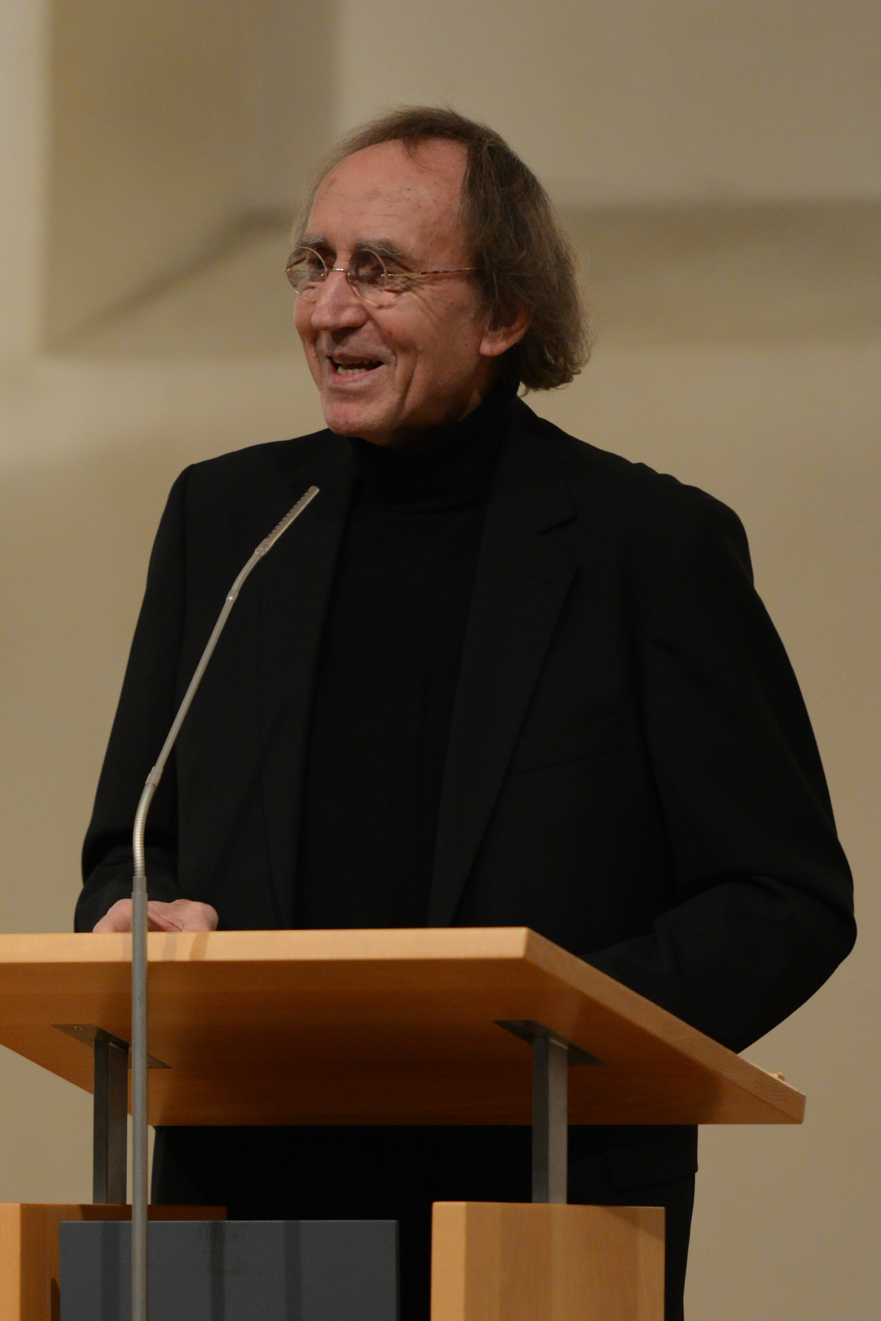 Gunter Hofmann bei einem Vortrag "Willy Brandt und Helmut Schmidt. Geschichte einer schwierigen Freundschaft" anlässlich des einhundertsten Geburtstags von Willy Brandt.